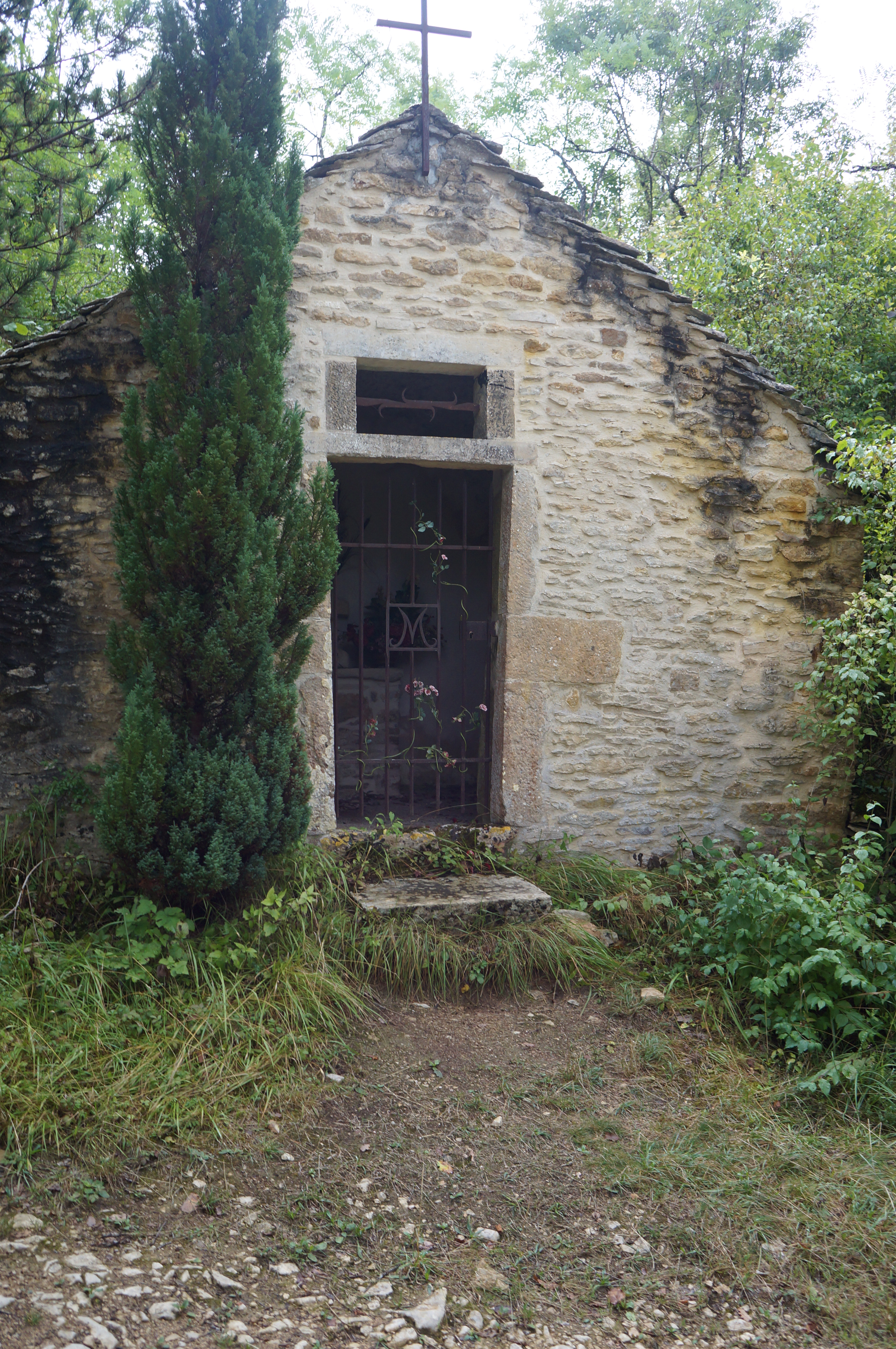 Chapelle Saint-Nicolas sur le chemin de liaison entre Asquins et le GR 13, Yonne Bourgogne, France